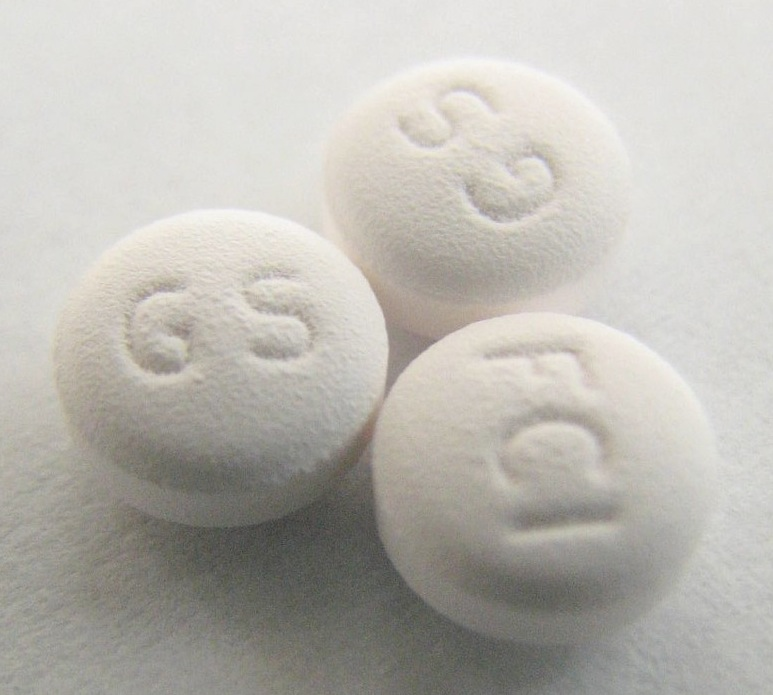 Paroxetine (Paxil) pills.